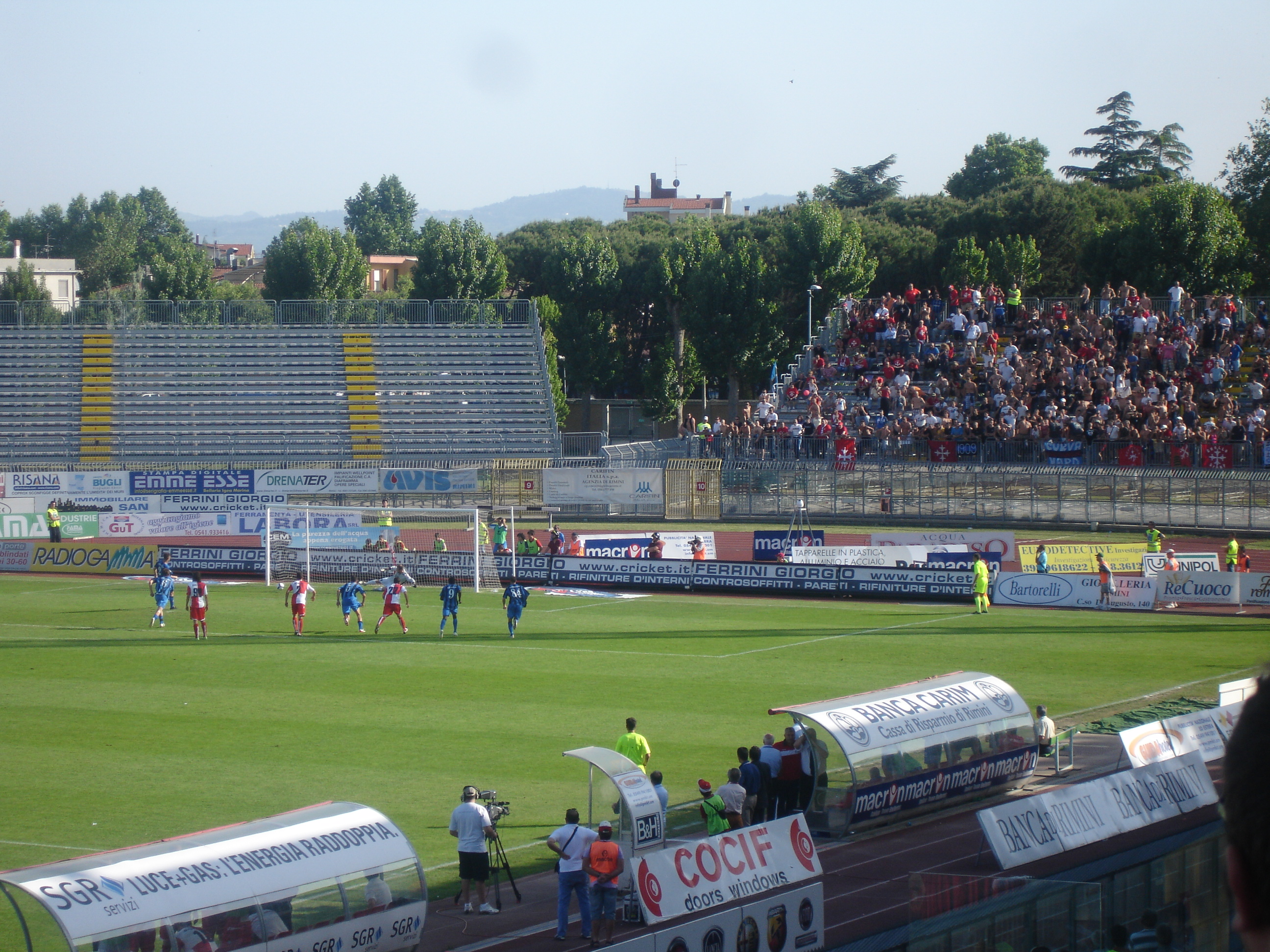 Gaël Genevier segna il rigore del pareggio pisano al 93° minuto dell'incontro Rimini-Pisa, campionato di serie B 2008/09. La rete è stata realizzata sotto al settore ospiti, presso lo stadio Romeo Neri di Rimini per il gol dell'1-1, gol che comunque non riuscì a garantire la parmanenza in cadetteria del sodalizio nerazzurro, visto la partita sciagurata giocata all'Arena la domenica successiva contro il Brescia , persa al 90°